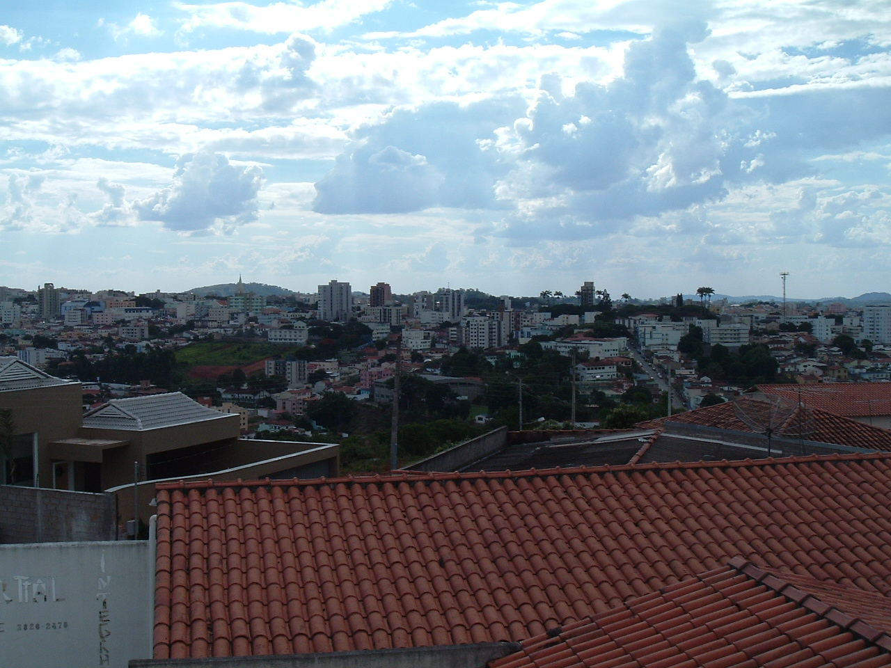 Lavras, MG., Brasil